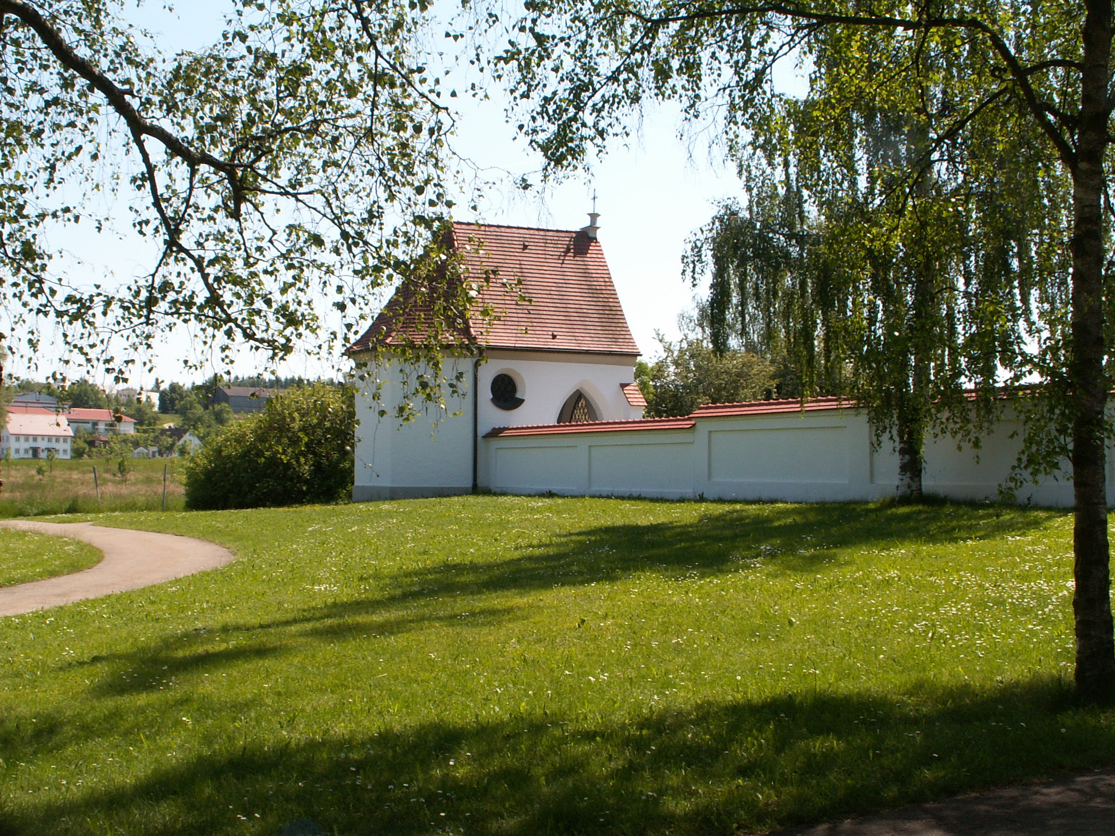 Friedhofskapelle in Ursberg